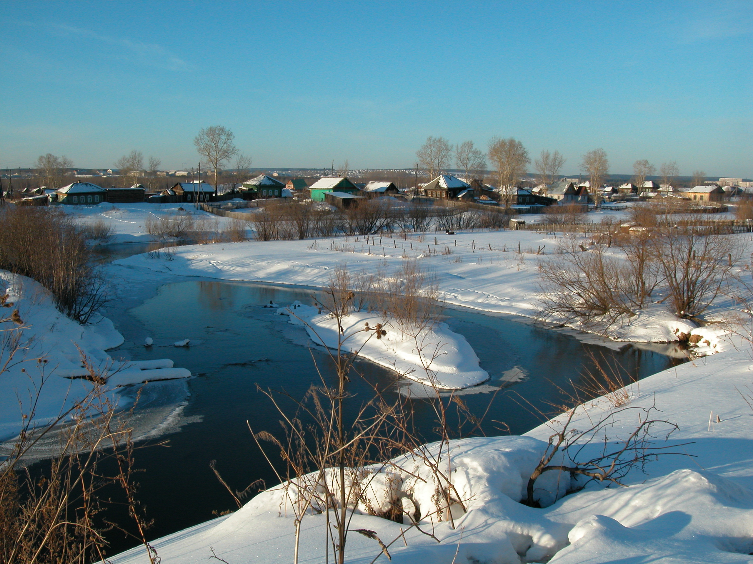 Река Усолка (приток Камы) в городе Соликамск